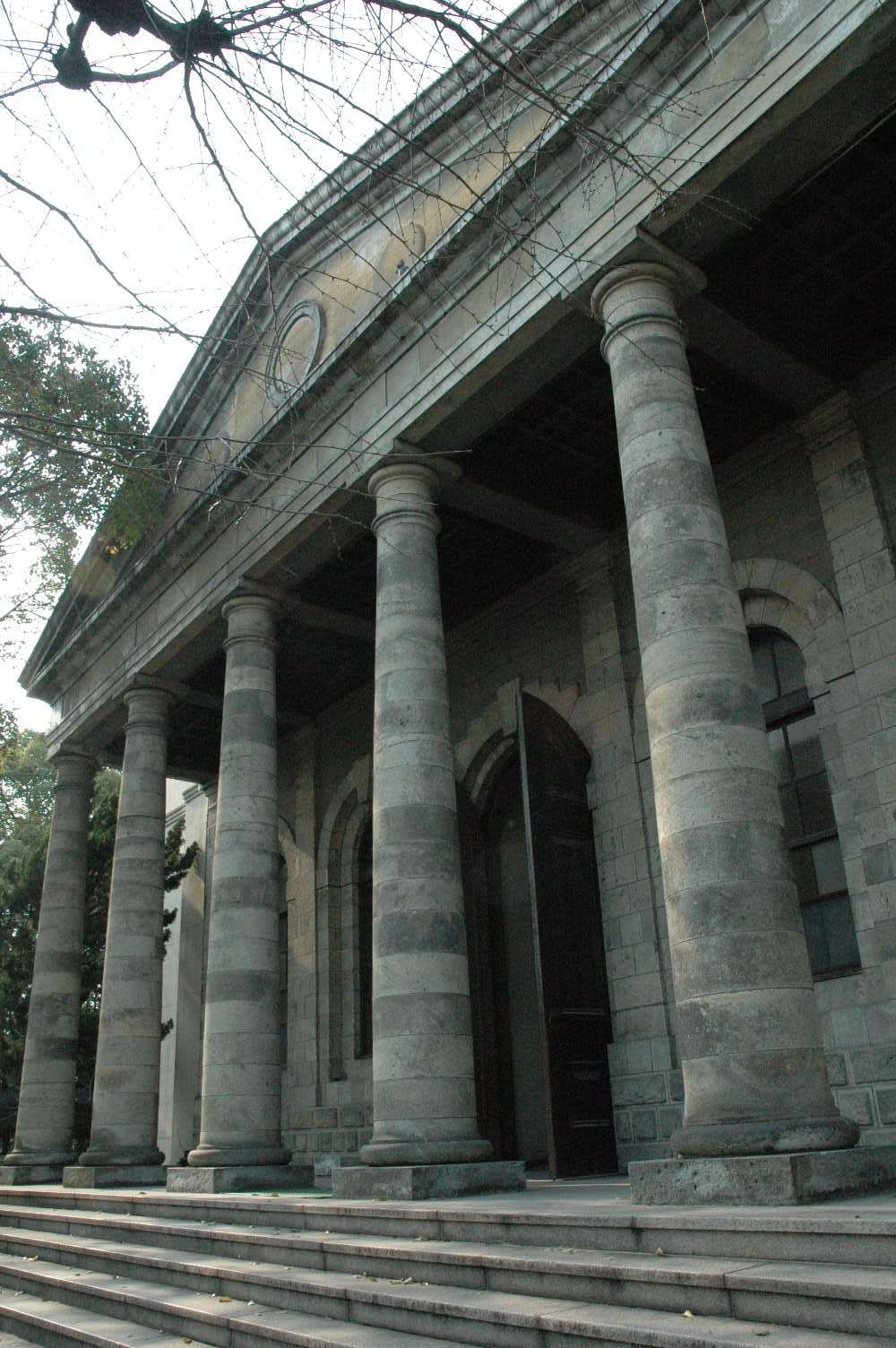 旧造幣寮鋳造所玄関部分（1870年、大阪市北区、設計:トーマス・ウォートルス）